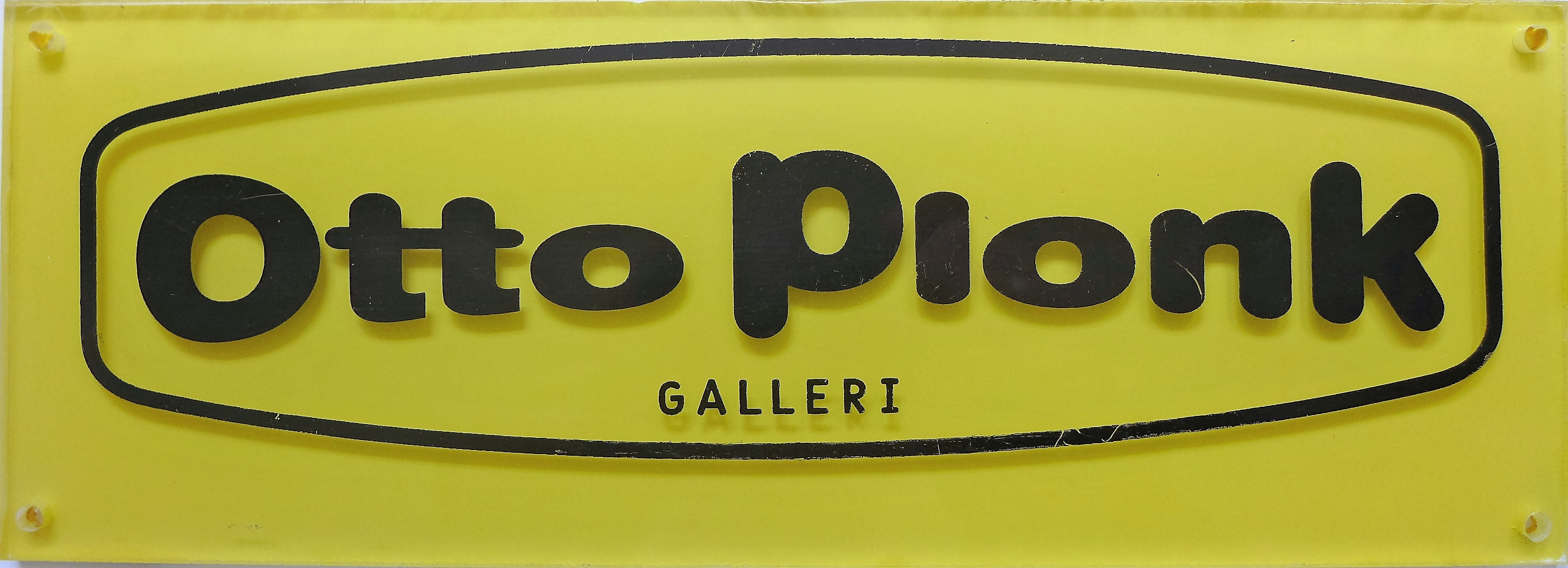 Skiltet som sto på utgangsdøren til galleriet